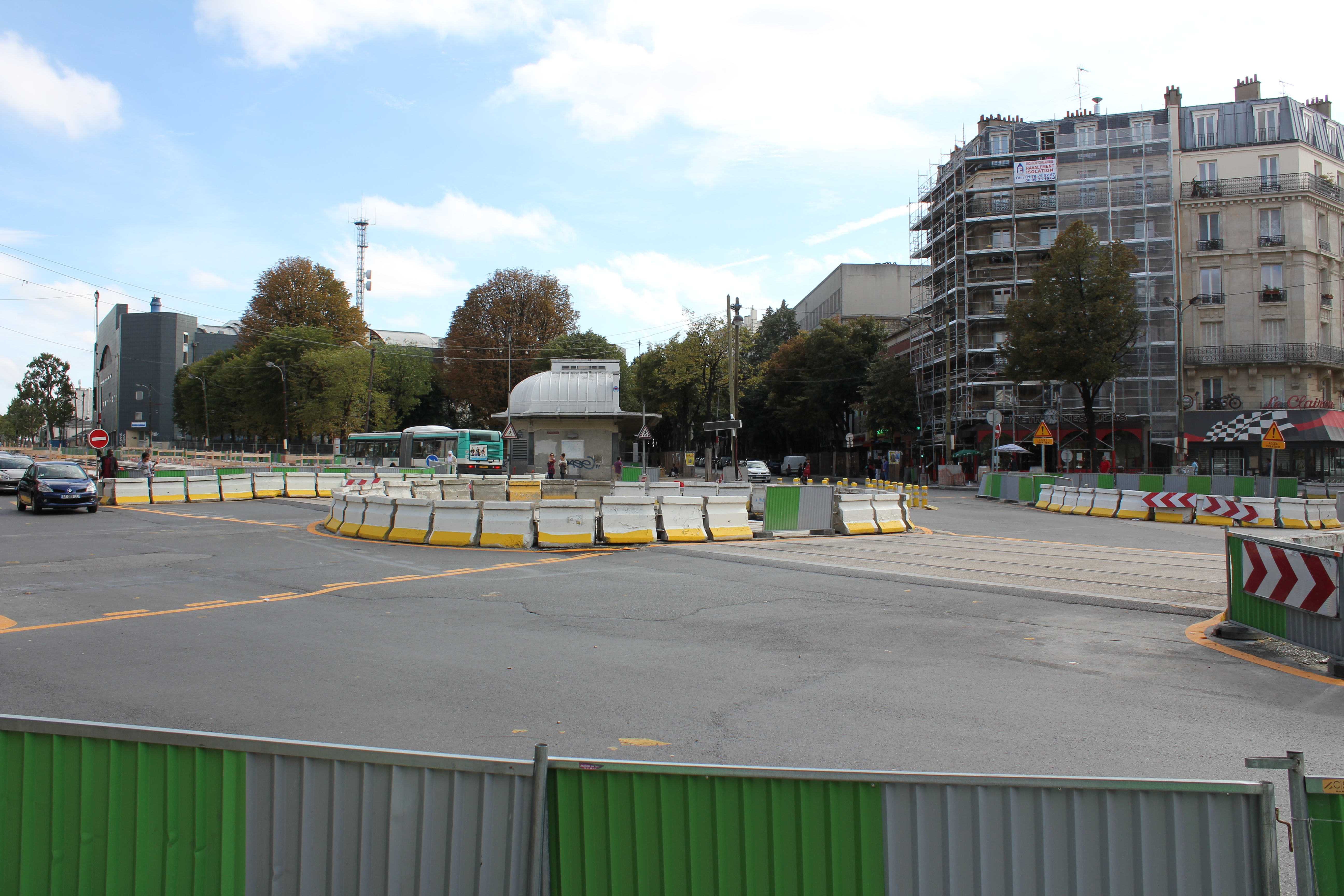 Travaux du T3 boulevard Mortier, dans le 20e arrondissement de Paris, France